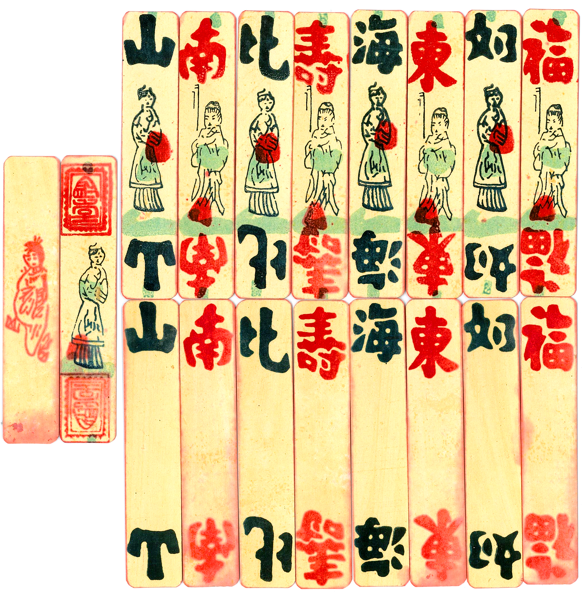 中文（台灣）: 四川重慶的娃兒牌